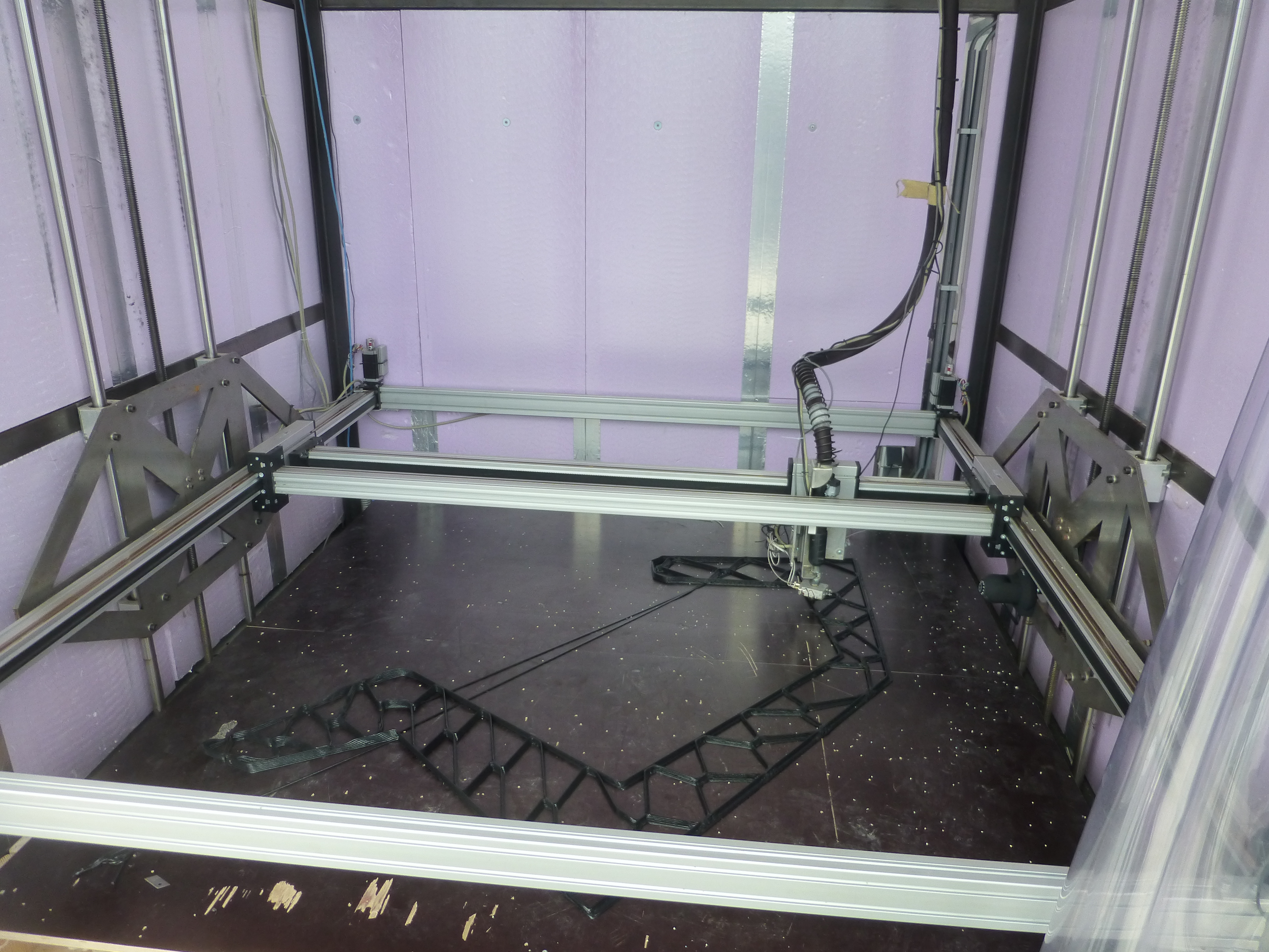 L'interno di una stampante 3d per costruire edifici